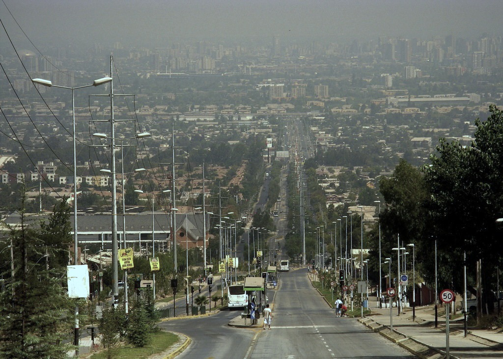 Avenida Grecia, vista desde Avenida Acueducto / Avenida Jacarandá hacia el horizonte. Comuna de Peñalolén, Santiago de Chile